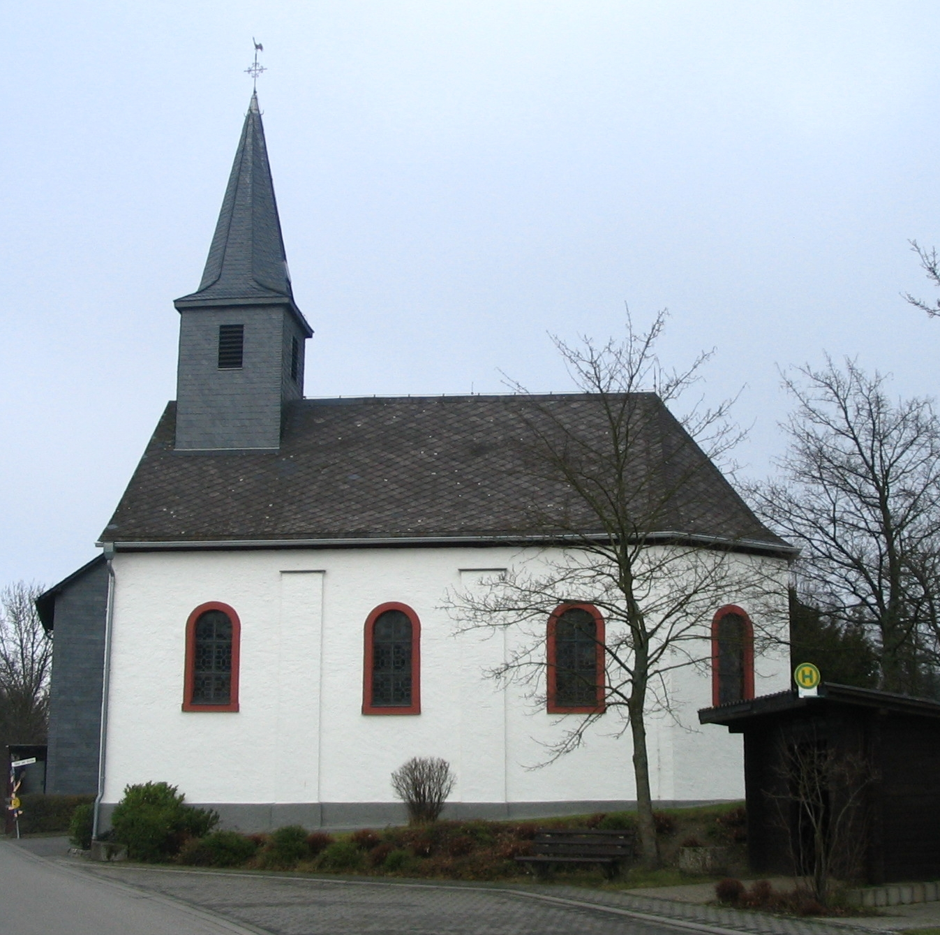 Kapelle in Panzweiler im Hunsrück